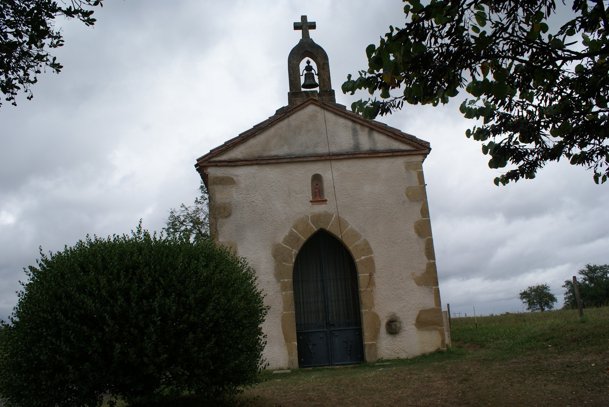 De gerestaureerde kapel van Péguilhan, geheten Chapelle Saint Germaine.